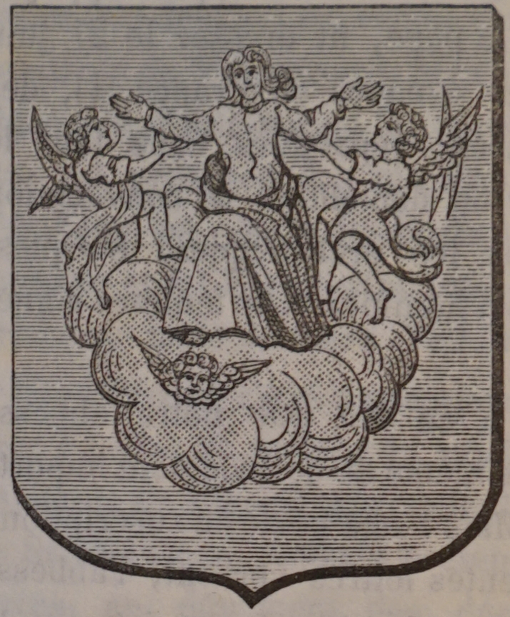 les armes de l'abbaye d'andecy ?